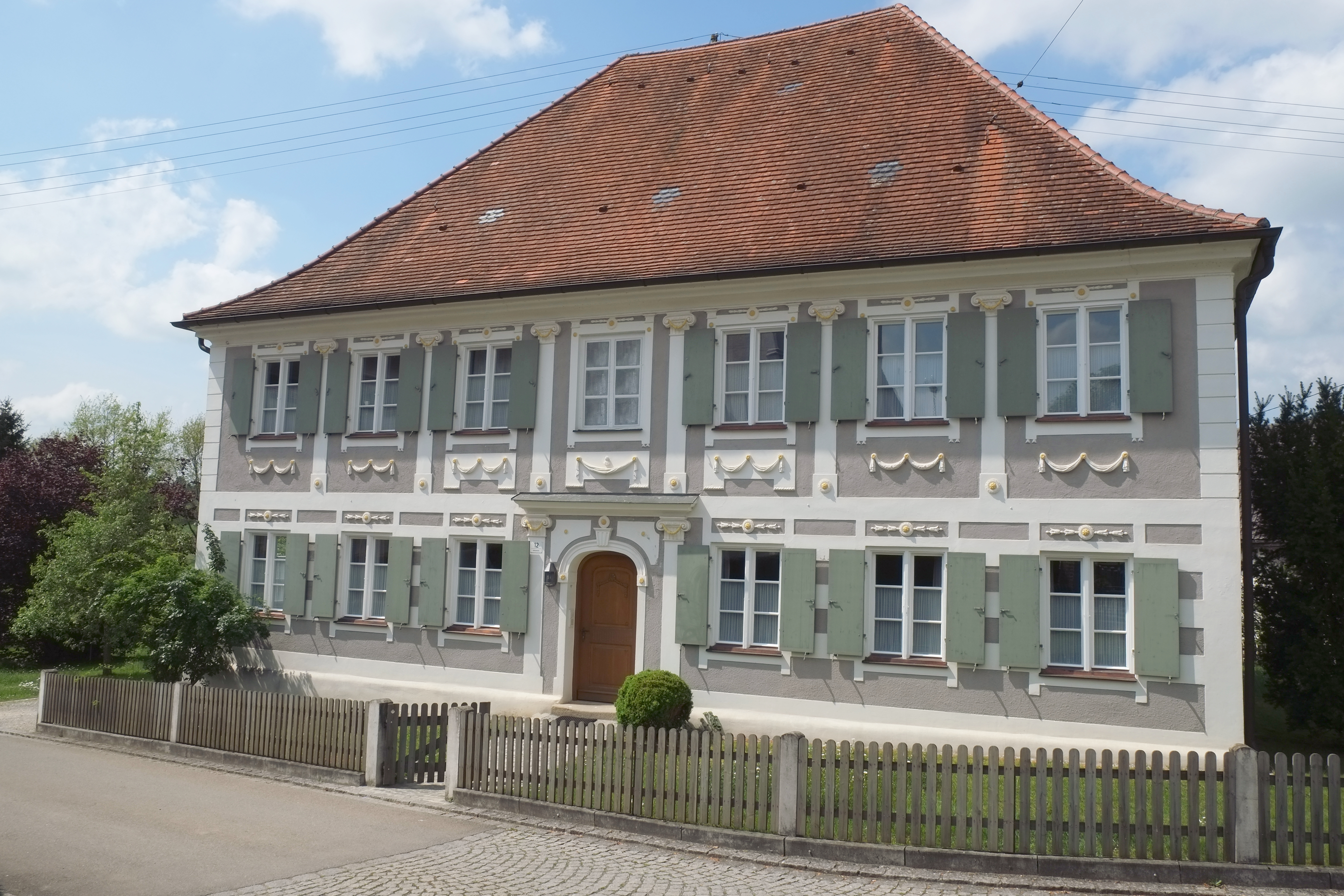 Pfarrhaus in Steinekirch im Landkreis Augsburg (Bayern, Deutschland)